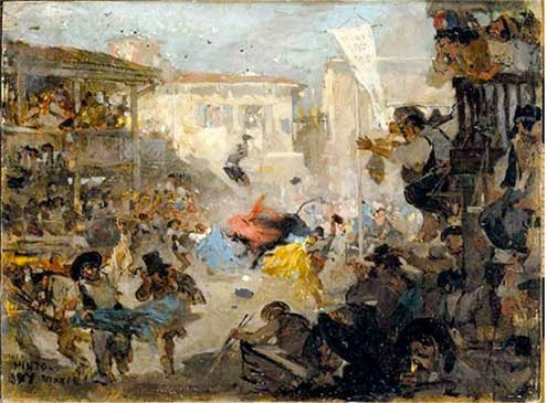 Pintura al óleo de Daniel Urrabieta Vierge, en la que se representa una corrida de toros en Pinto (Madrid, España).